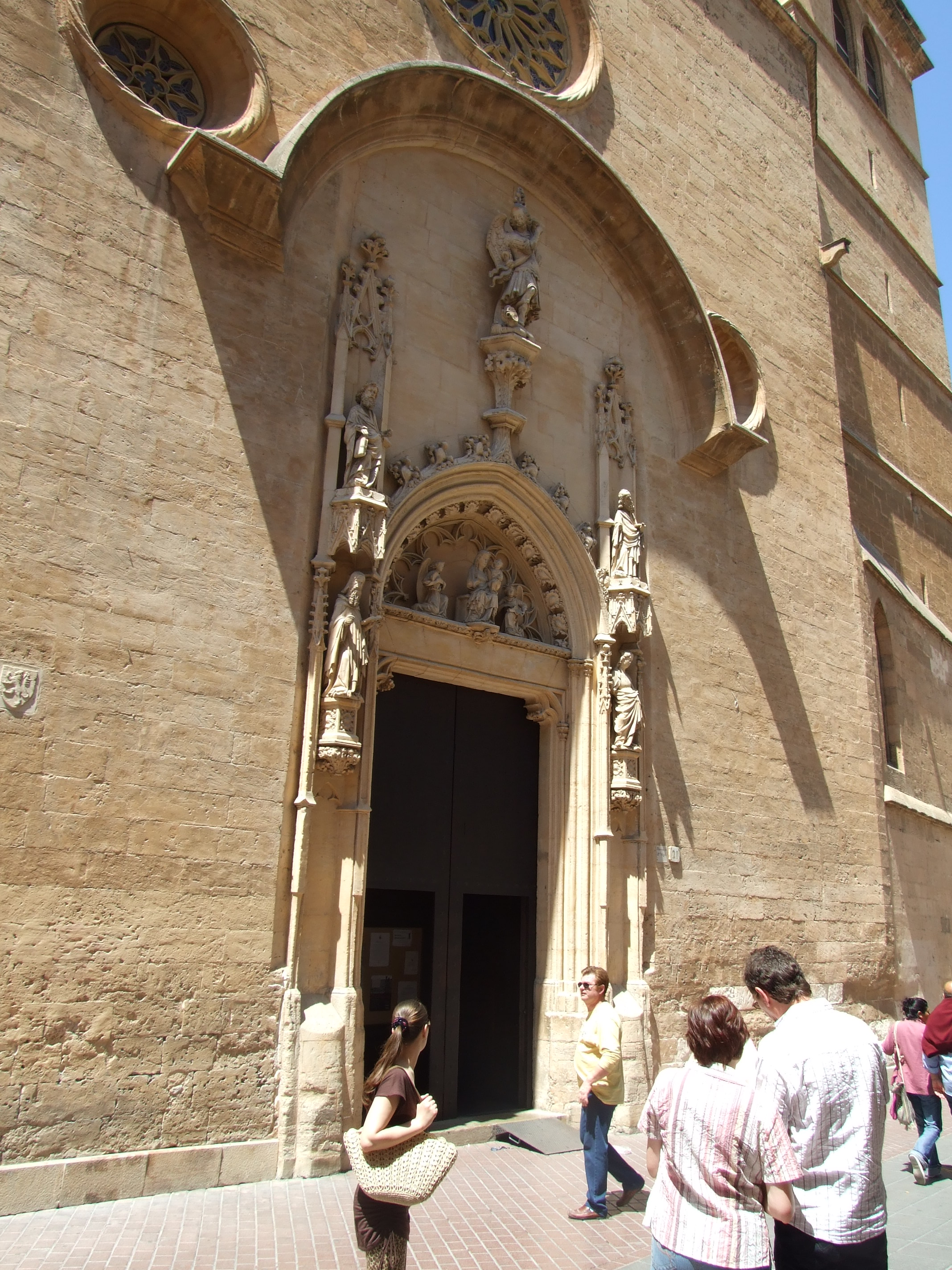 Façana de la Parròquia de Sant Miquel de Palma, Mallorca.